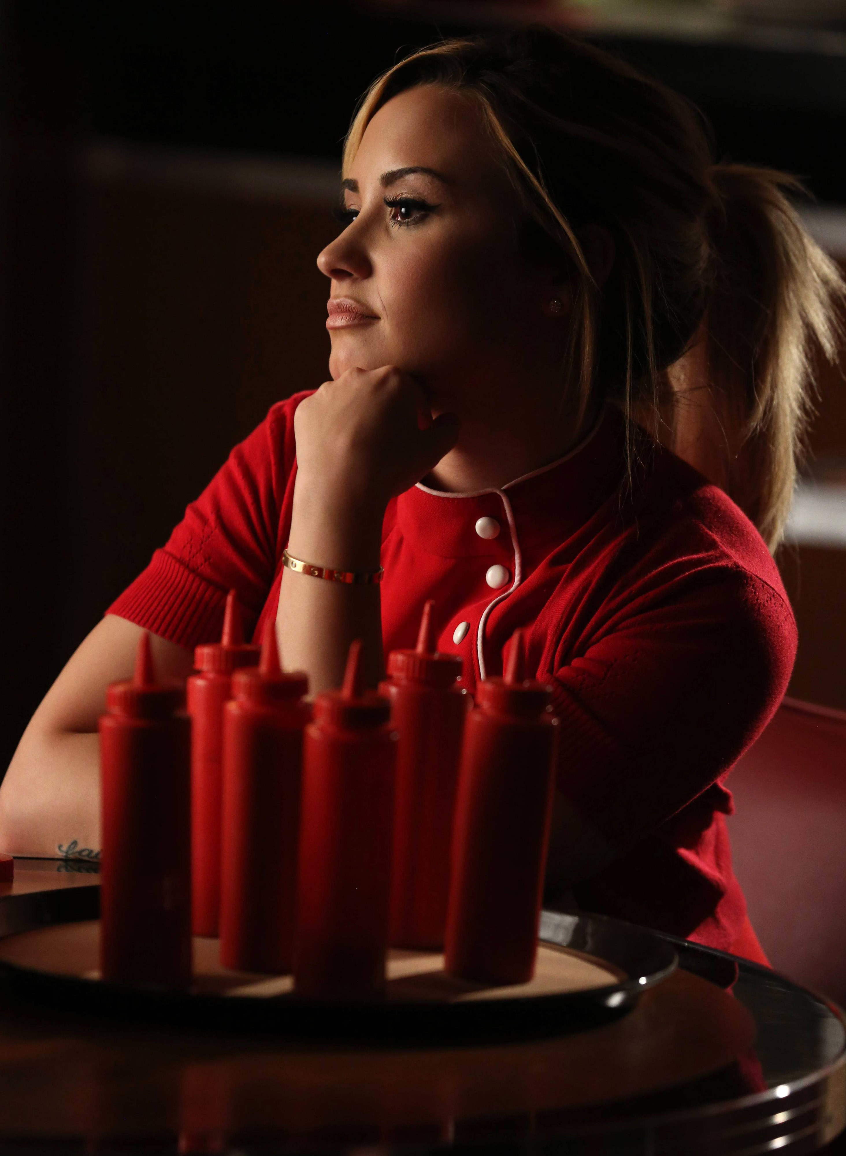 Demi Lovato tijdens haar rol bij Glee nl. Dani